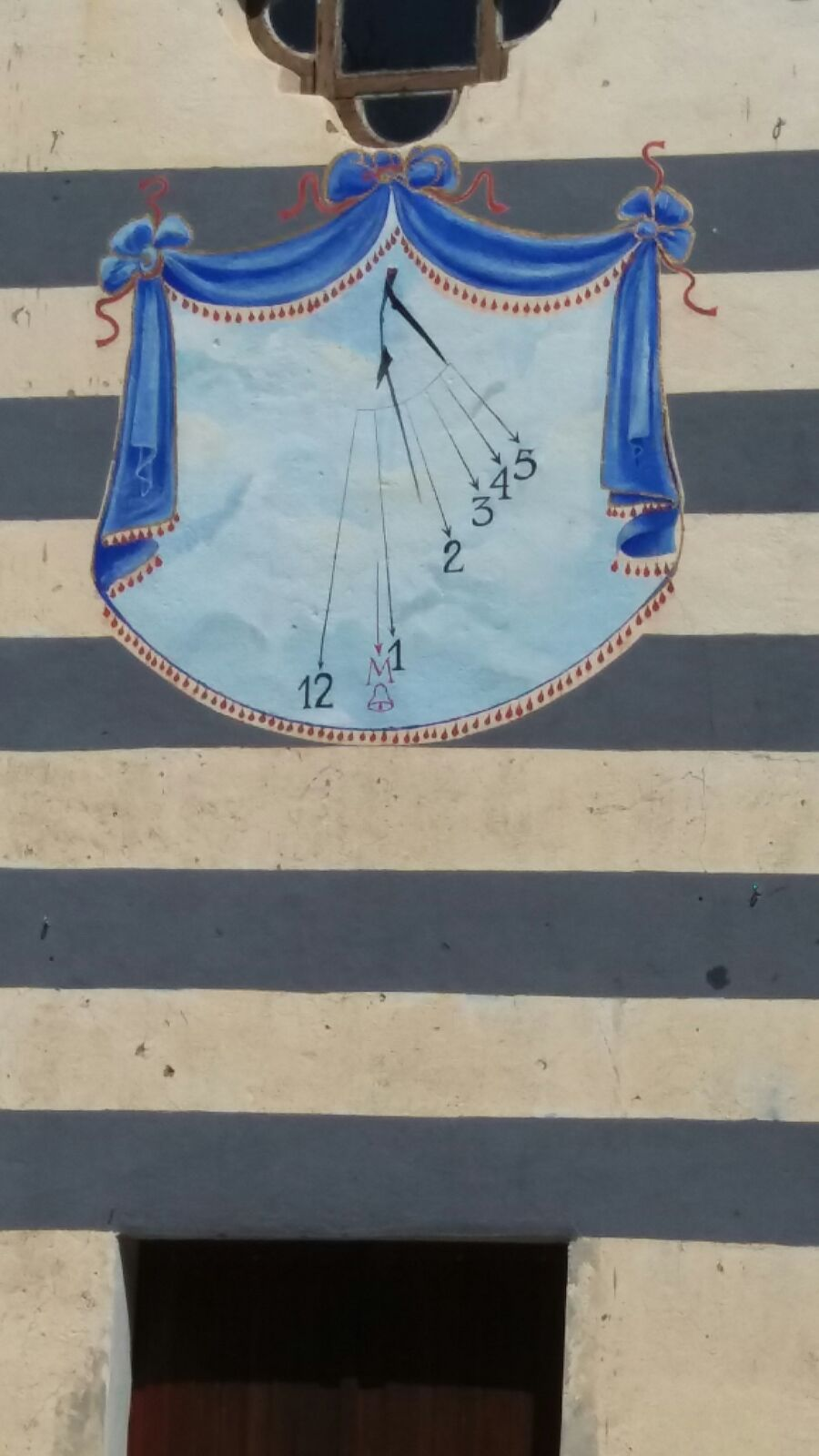 Cappella Madonna della Guardia in Località Dano a Piampaludo (Sassello) dopo la ristrutturazione della facciata Particolare della meridiana